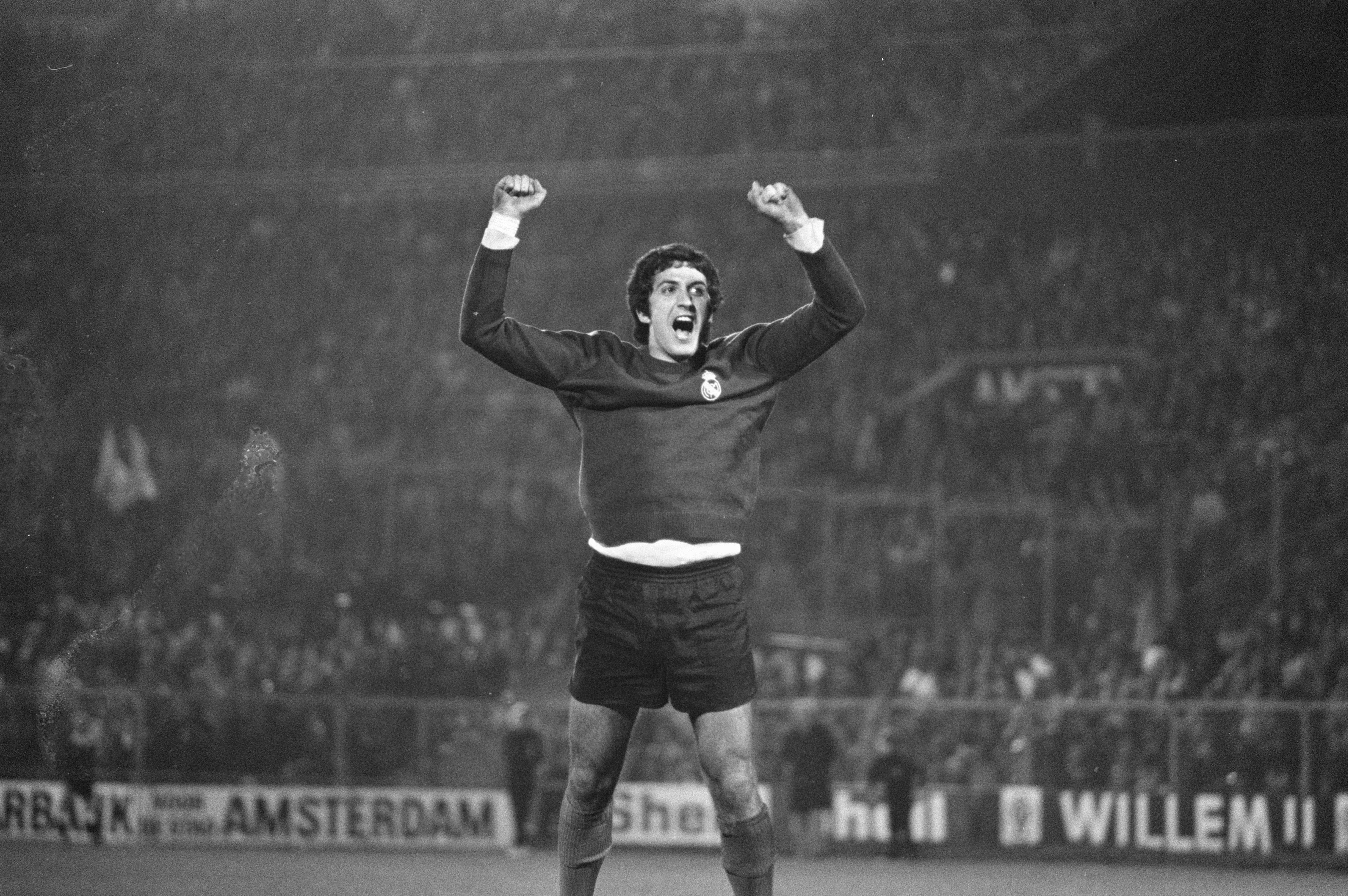 Collectie / Archief : Fotocollectie Anefo Reportage / Serie : [ onbekend ] Beschrijving : Ajax tegen Real Madrid 2-1, halve finale Europacup I , keeper Garcia Remon van Real maakt vreugdesprong Datum : 11 april 1973 Trefwoorden : keepers, sport, voetbal Instellingsnaam : Real Madrid Fotograaf : Peters, Hans / Anefo Auteursrechthebbende : Nationaal Archief Materiaalsoort : Negatief (zwart/wit) Nummer archiefinventaris : bekijk toegang 2.24.01.05 Bestanddeelnummer : 926-3381